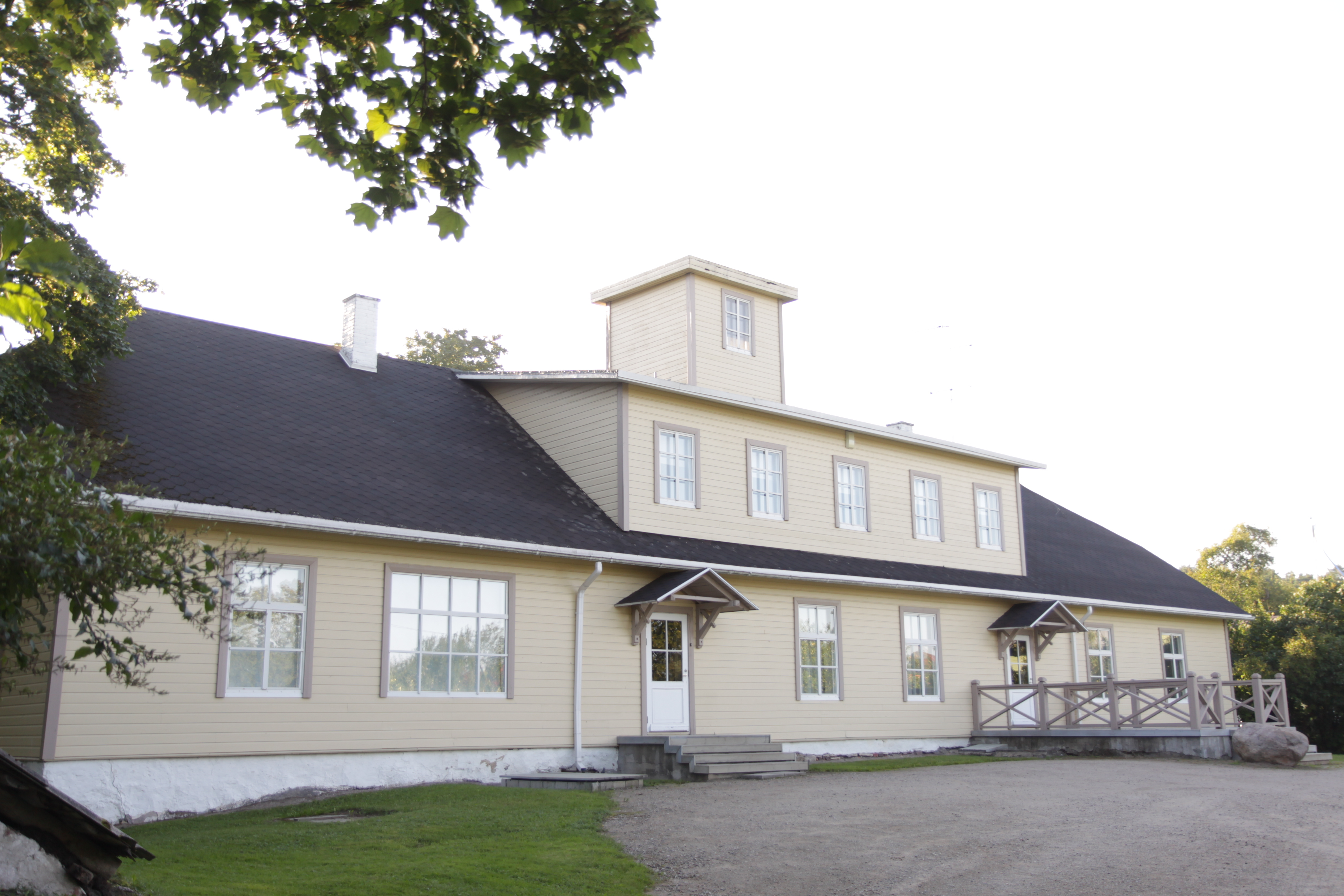 Käsmu merekooli hoone. Käsmu küla, Neeme tee 48